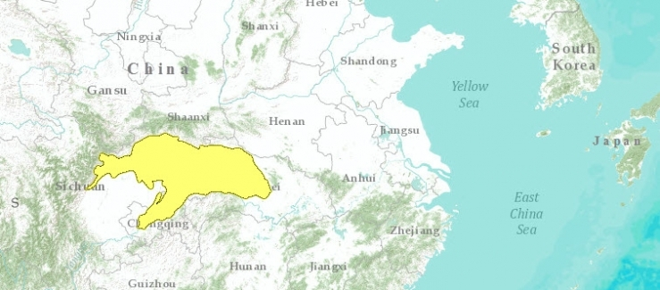 Mappa Ecoregione PA0417 - Foreste sempreverdi dei monti Daba